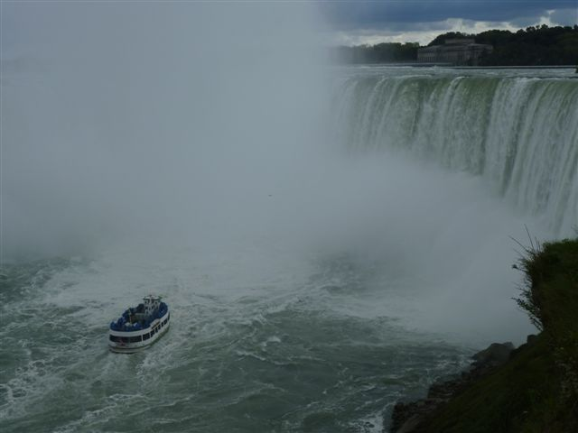 Maid of the Mist vor den Hufeisenfällen von Kanada